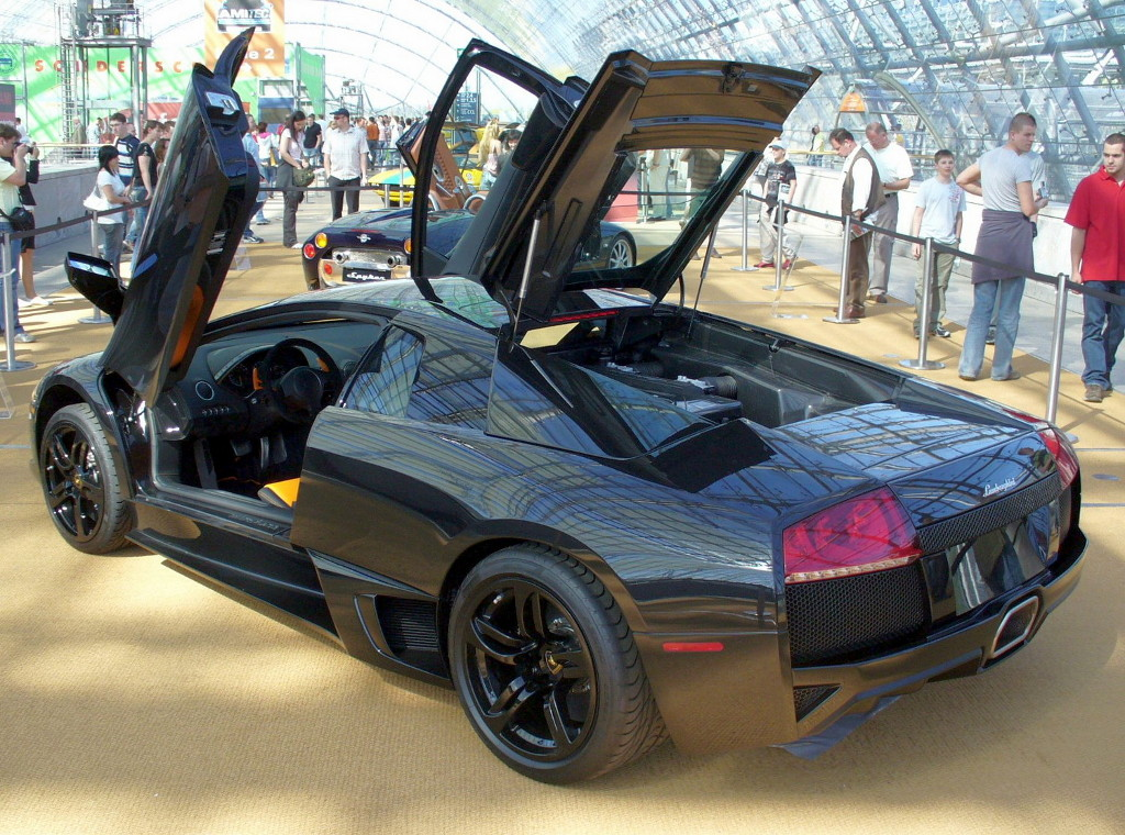 Lamborghini Murciélago LP640